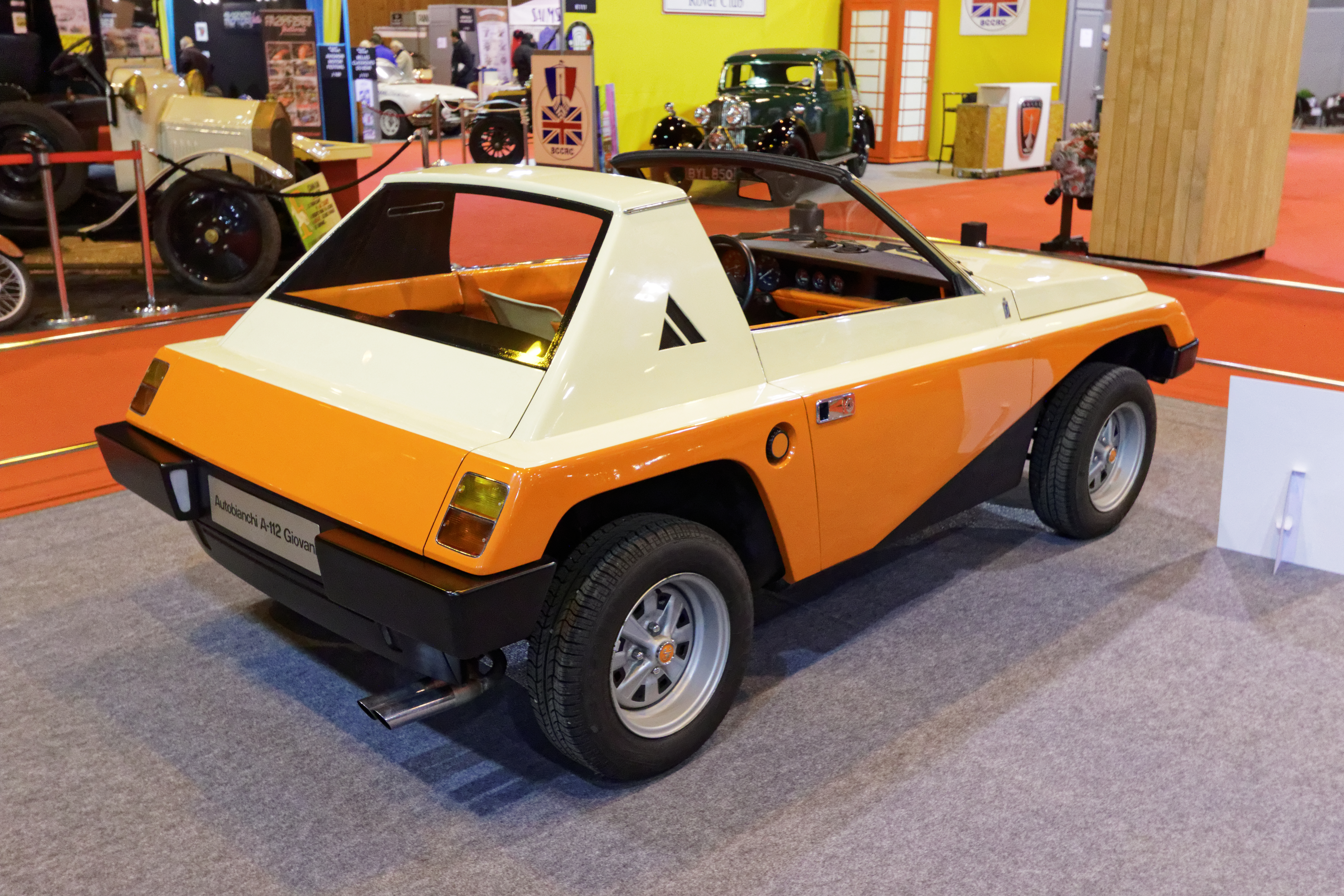 Une des voiture présentée lors du salon Rétromobile de Paris 2015